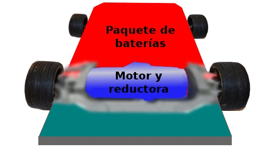 Esquema de la distribución de las baterías, motor y reductora en un automóvil eléctrico Telsa Model S.